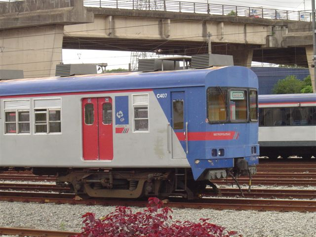 Linha E - 4400 - CPTM